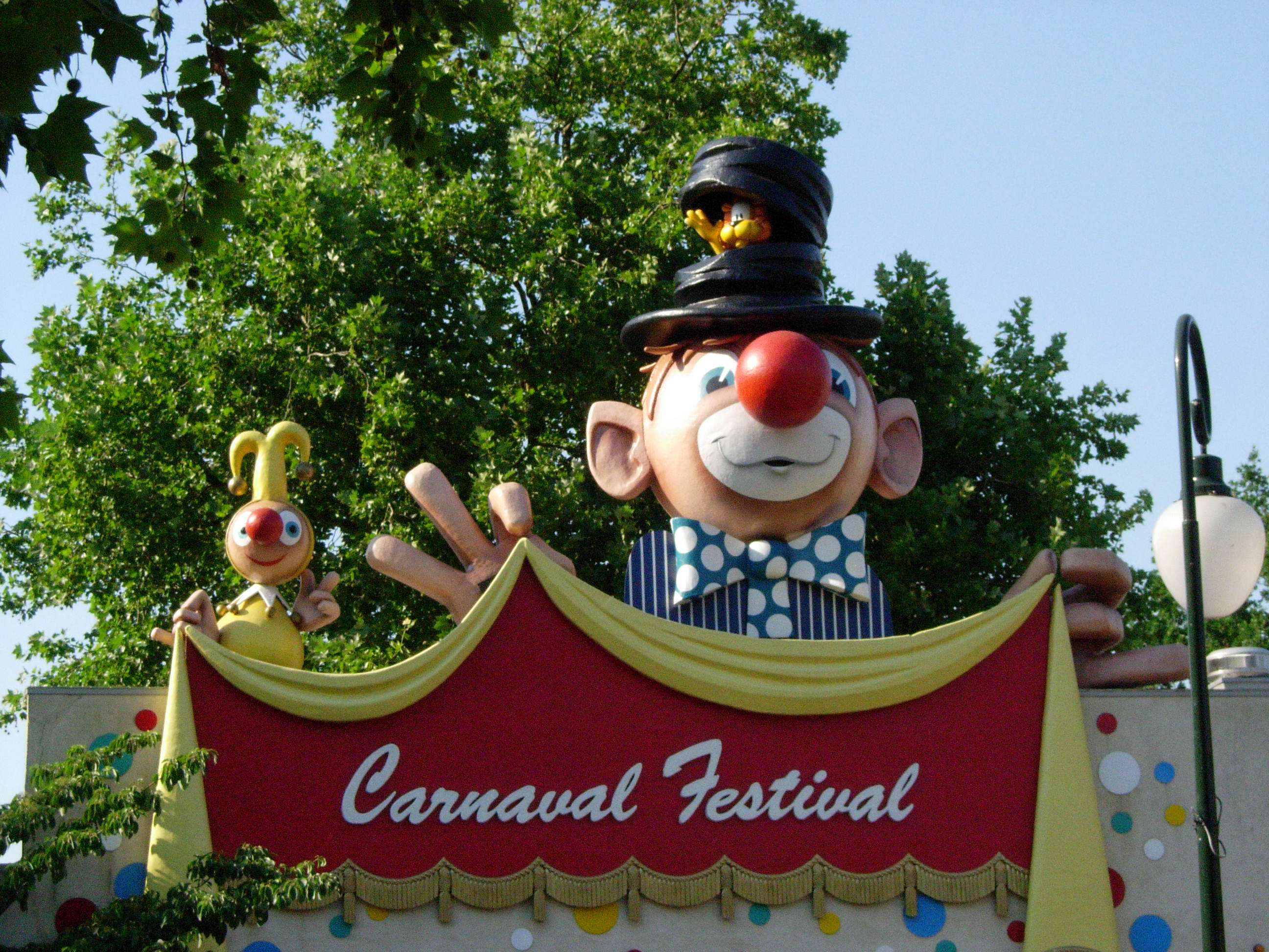 Entrée de Carnaval Festival avec Loeki